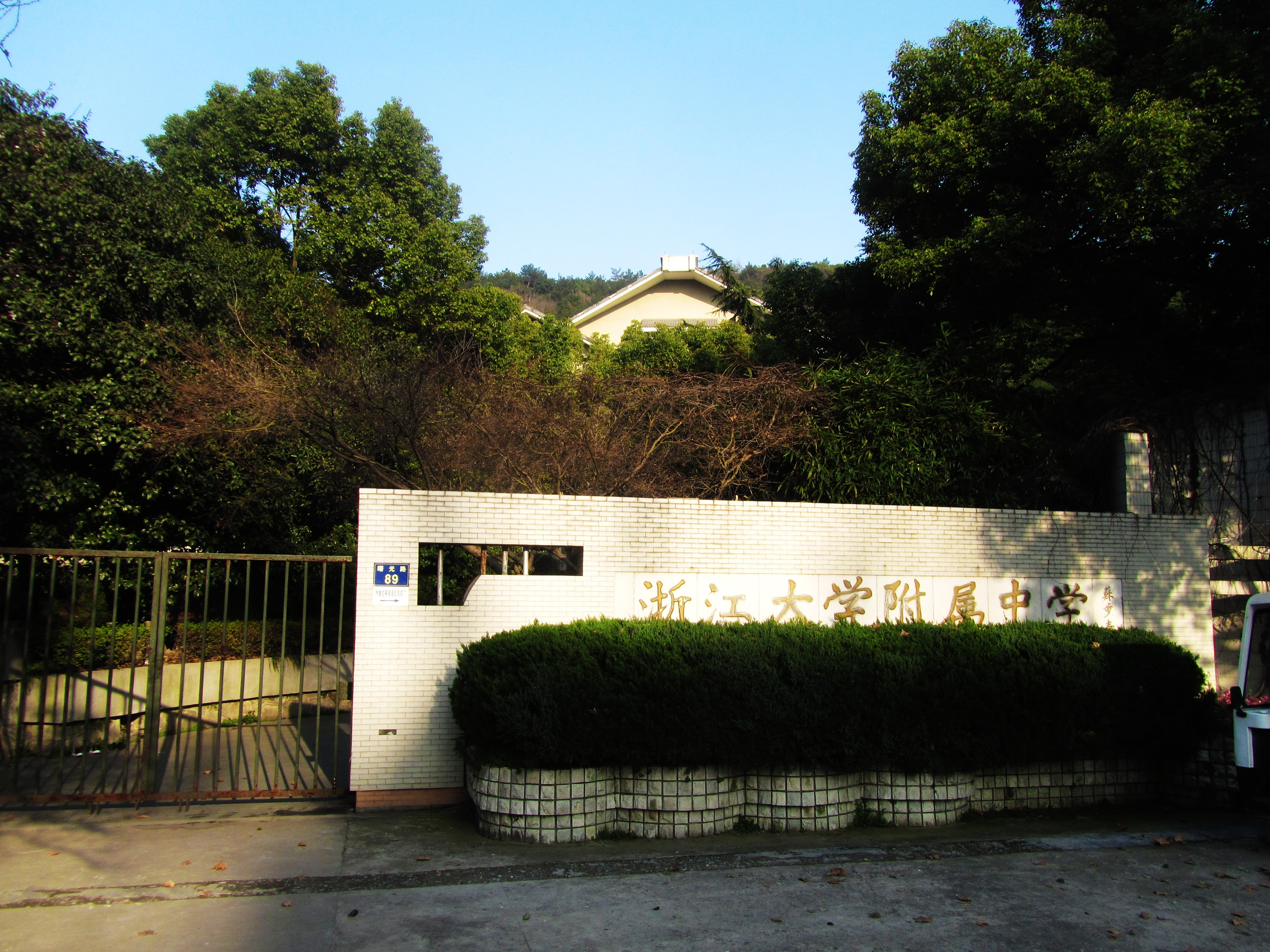 曙光路89号，浙江大学附属中学校门。